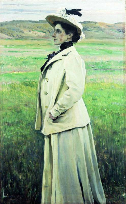 Портрет княгини Н.Г.Яшвиль. 1905